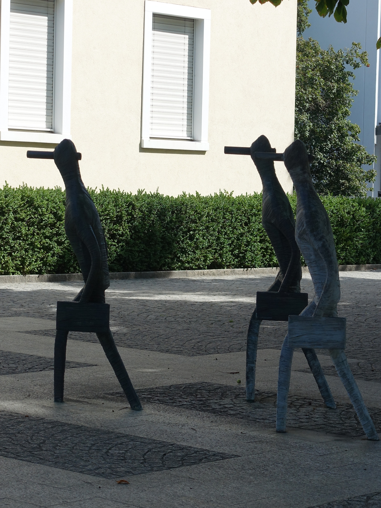 Skulptur Gruppe, Normalisierte Gesellschaftsmaschinen, Kantonalbank Rheinfelden, Aargau. Von Valery Heussler-Maler (1920-2007)